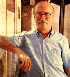 Jose María Vidal Villa en su despacho de la facultad de económicas de la Universidad de Barcelona.